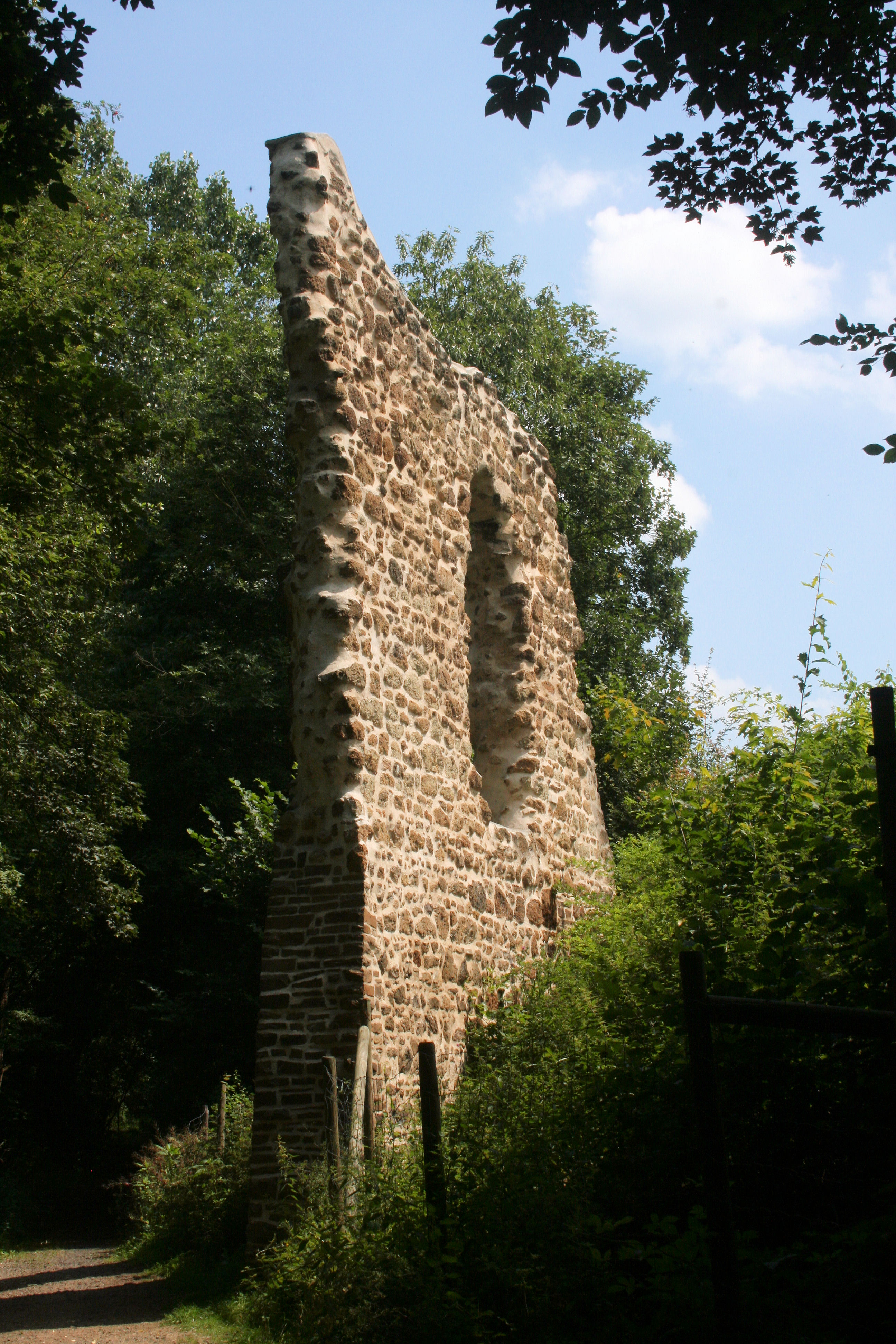 Ruine Ulrather Hof in Siegburg